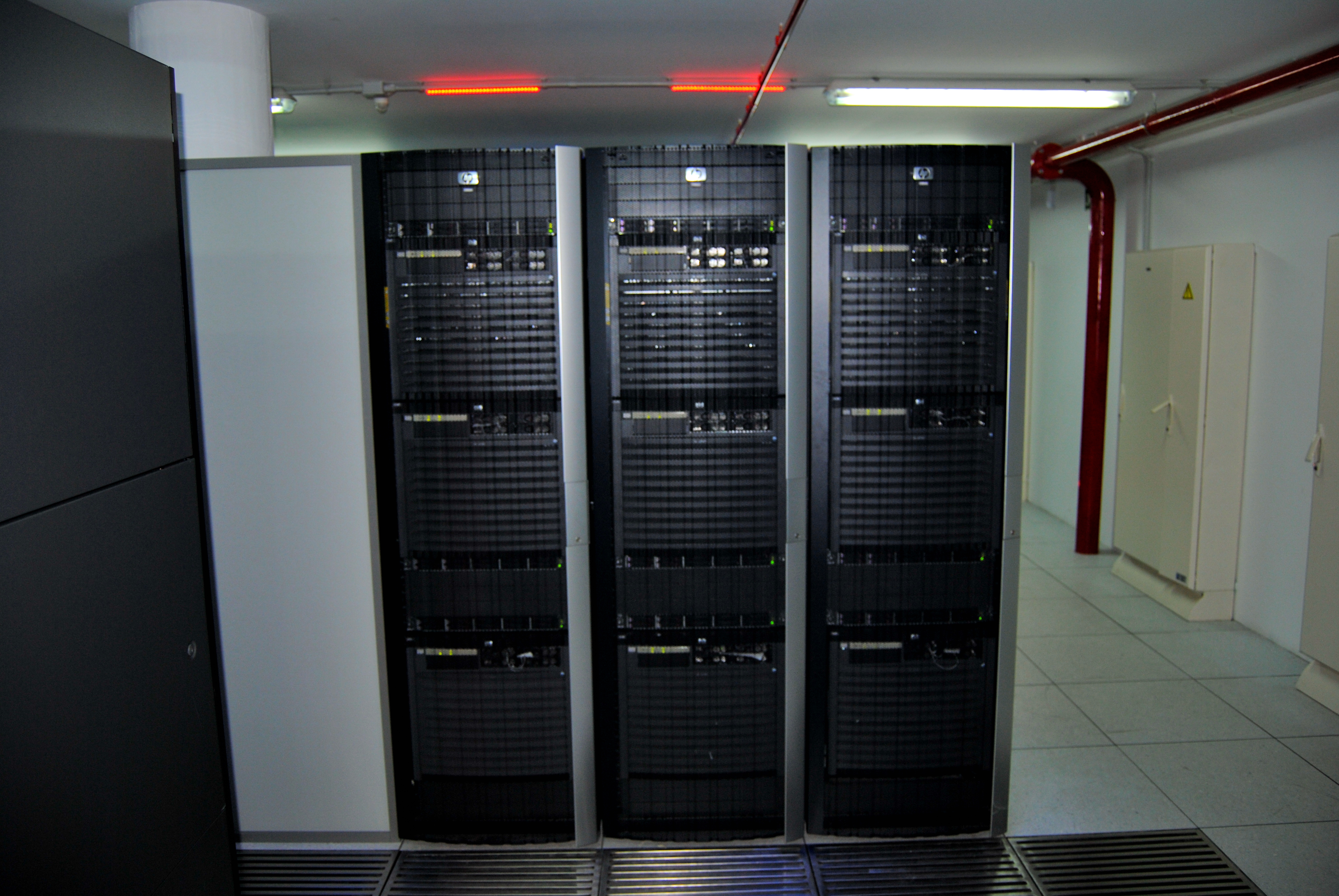 HP Integrity rx7640 servers